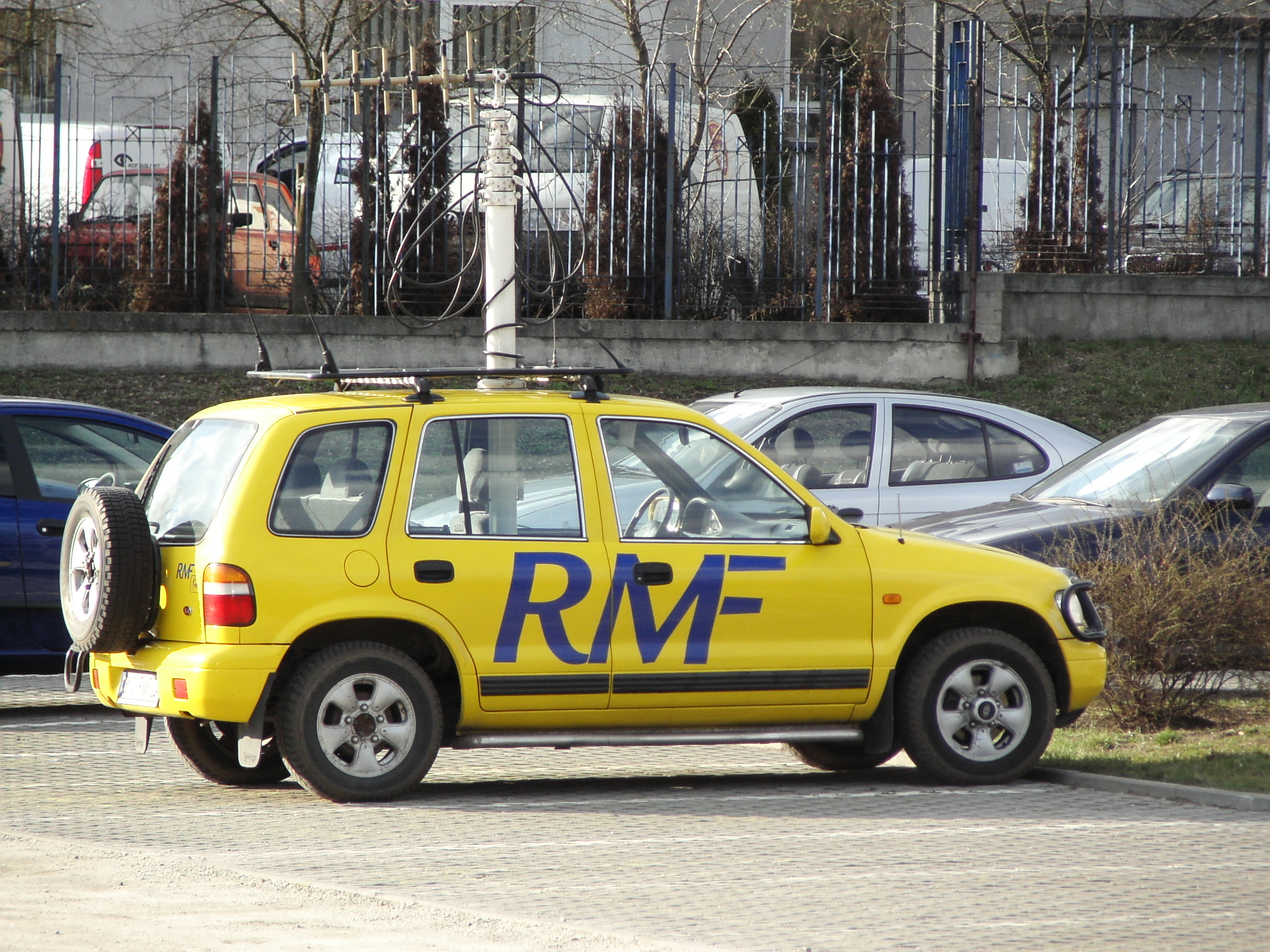 RMF FM wóz reporterski na parkingu w Poznaniu.